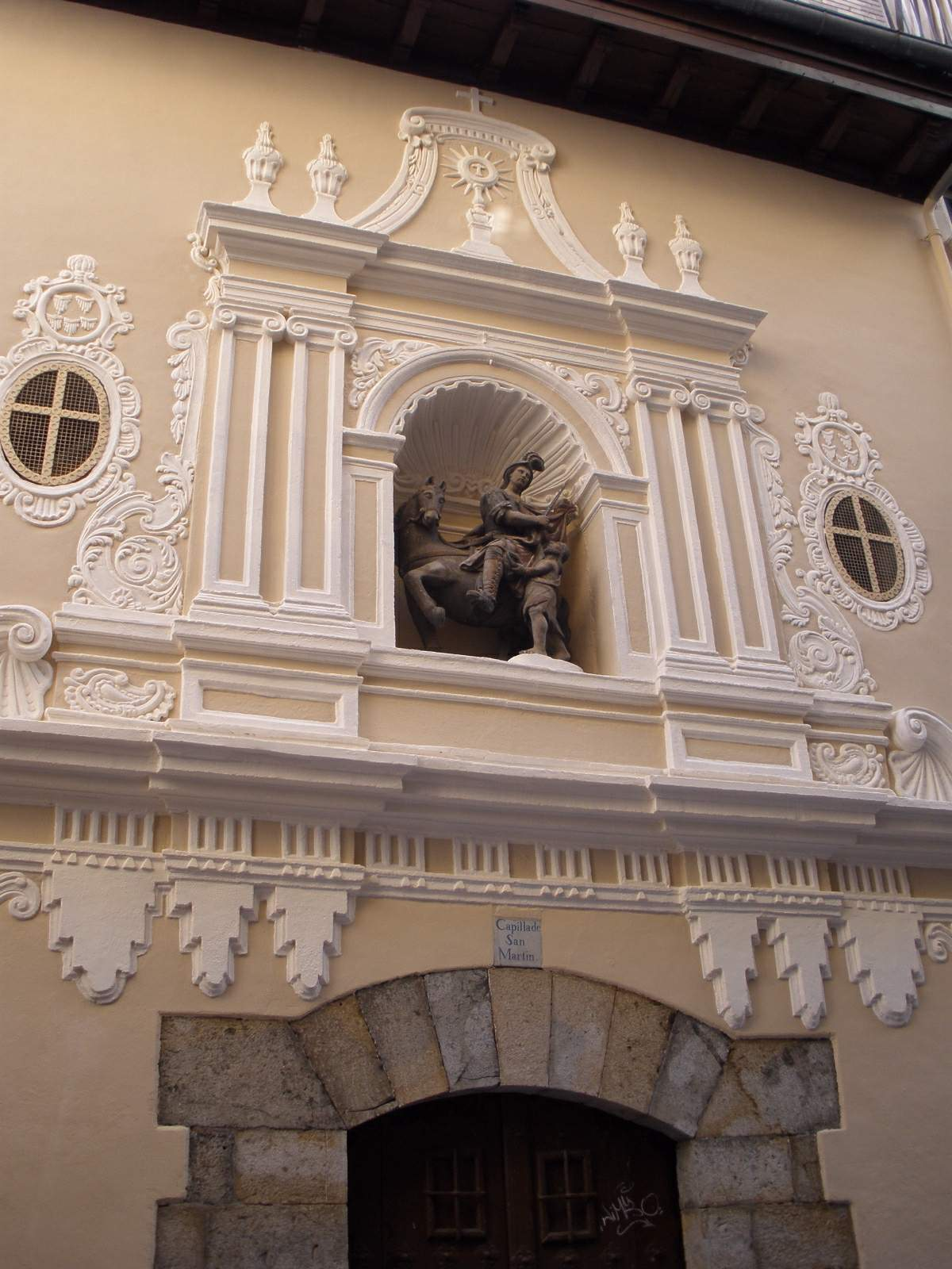 Pamplona - Capilla de San Martín